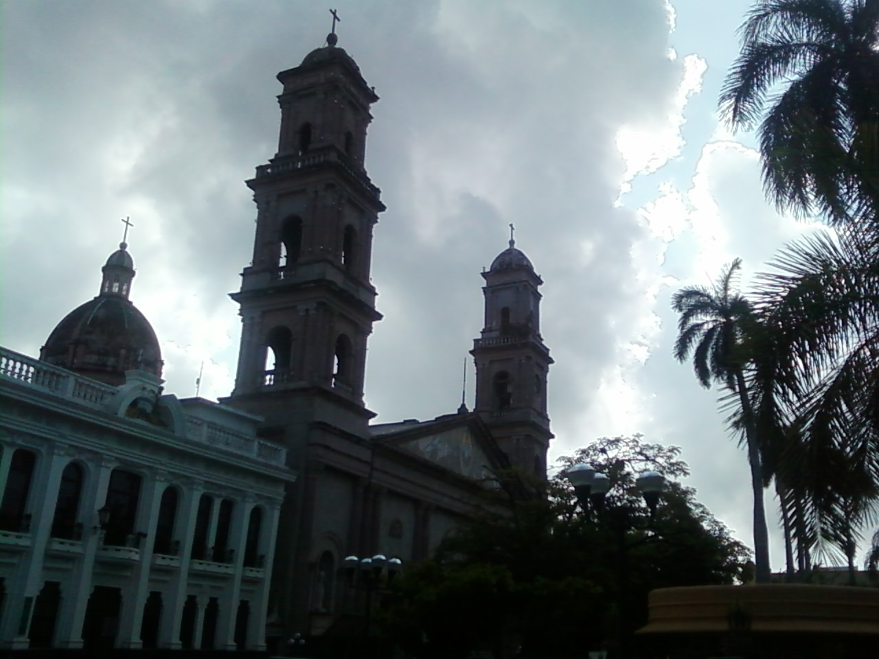 Es la catedral de la Diócesis latina de Tampico